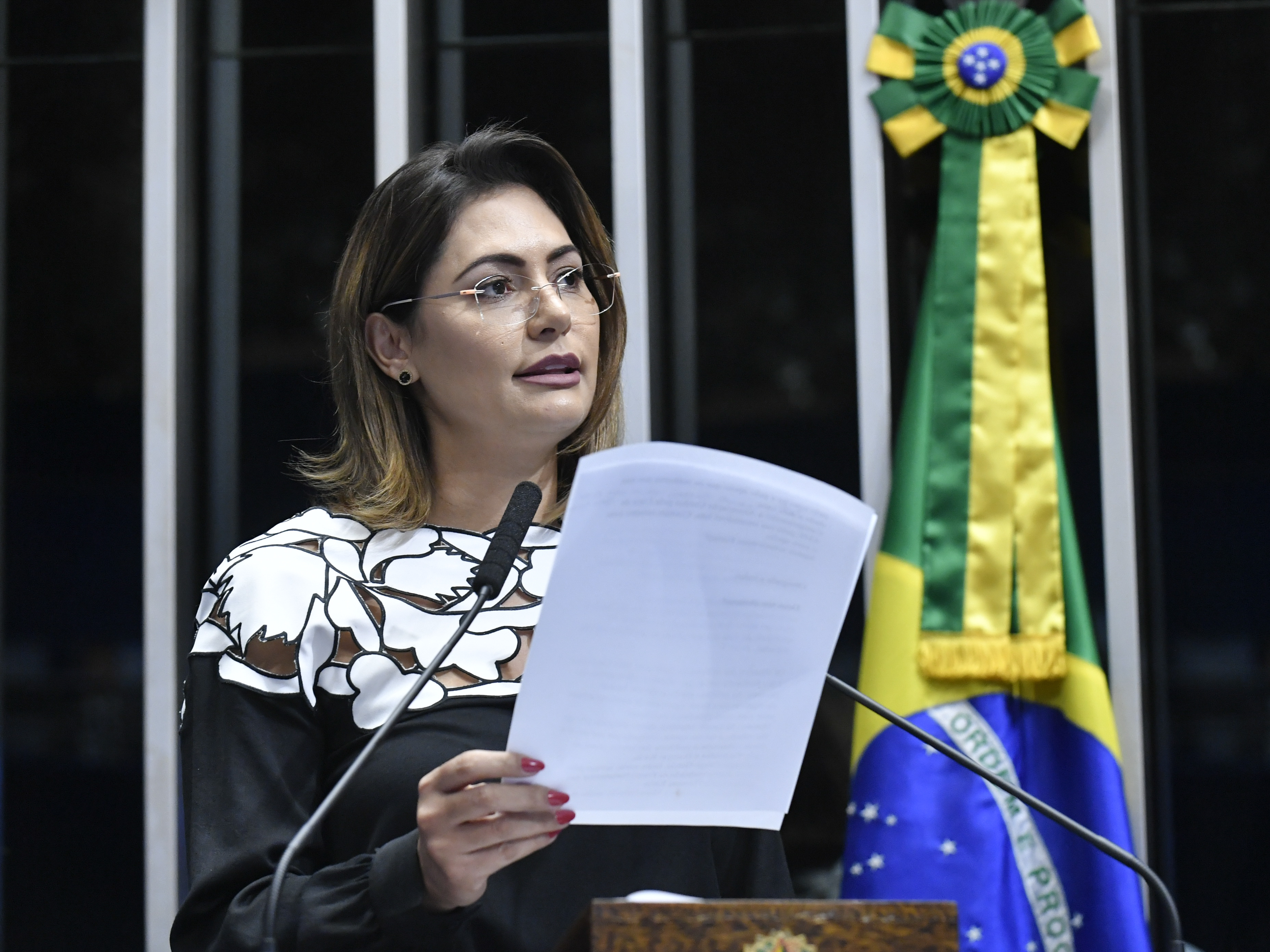 Comissão de Assuntos Sociais (CAS) realiza reunião para assinatura de Portaria do Ministério da Saúde (Remédio Spinraza). A comissão recebe o ministro da Saúde que assinará Portaria do Ministério da Saúde que regulamenta a disponibilização, pelo Sistema Único de Saúde (SUS), do remédio Spinraza, destinado aos pacientes da doença rara amiotrofia muscular espinhal (AME). A doença compromete o funcionamento de músculos e órgãos. Em discurso, à tribuna, primeira-dama, Michelle Bolsonaro. Foto: Geraldo Magela/Agência Senado